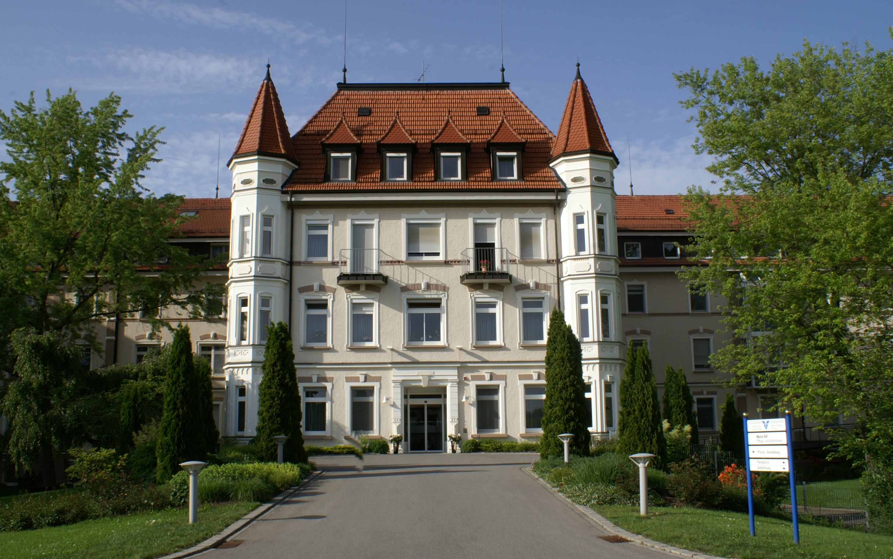 Pflegeheim Maria Hilf der Barmherzigen Schwestern vom heiligen Vinzenz von Paul in Untermarchtal